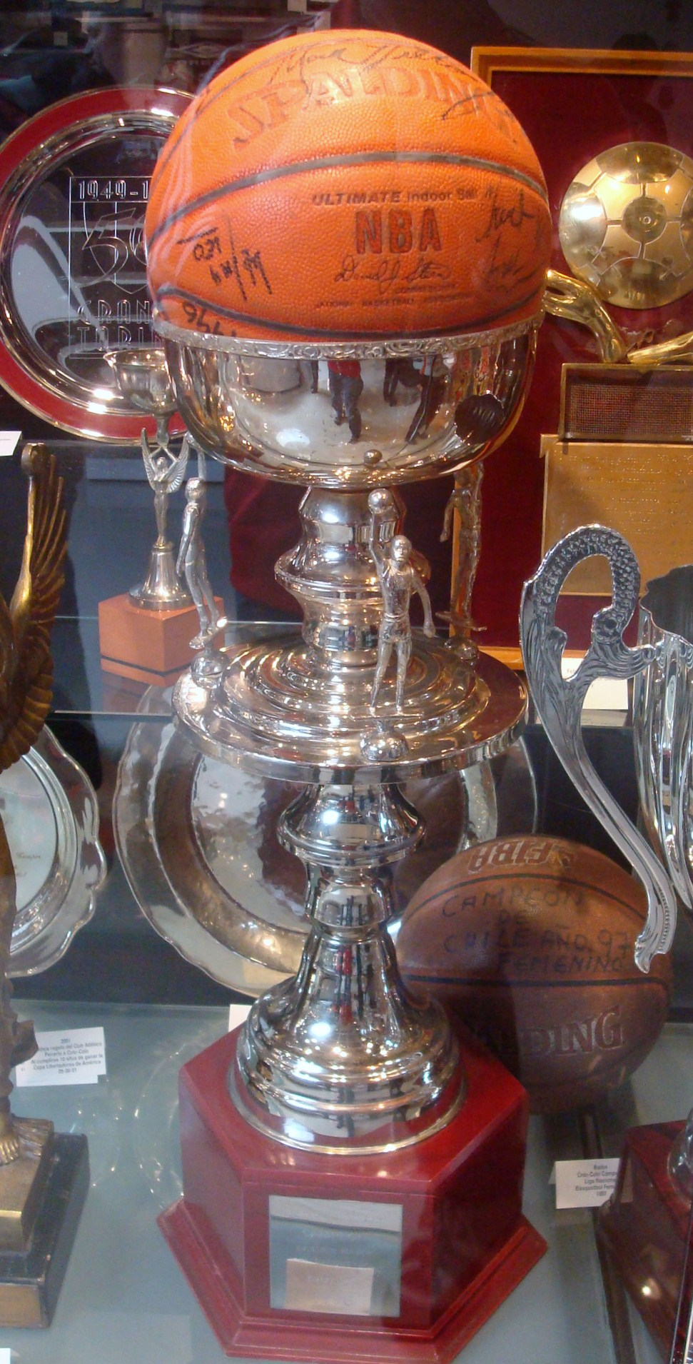 Copa de la DIMAYOR de 1996 ganada por Colo-Colo